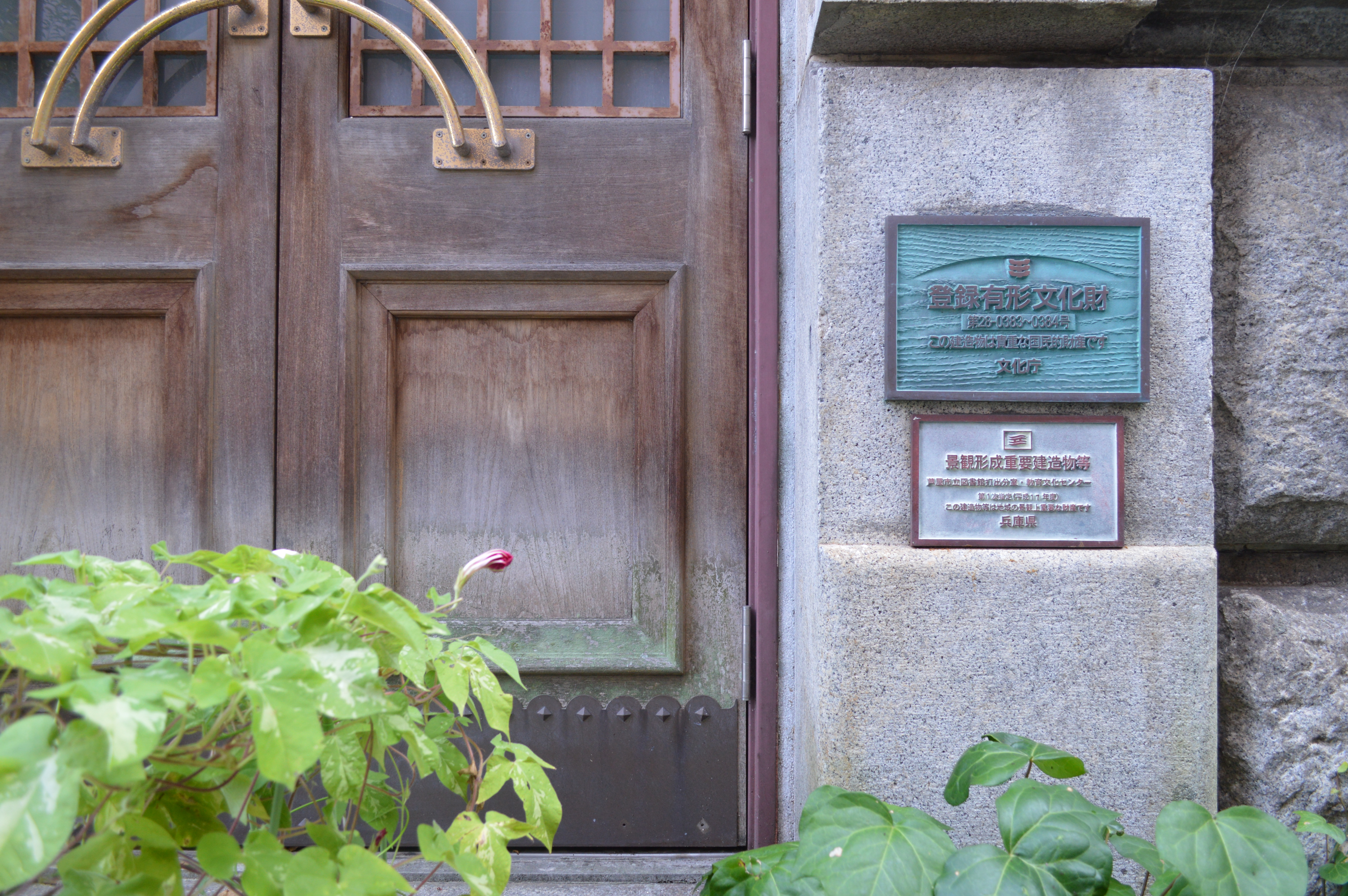 芦屋市立図書館打出分室（旧芦屋市立図書館本館）。